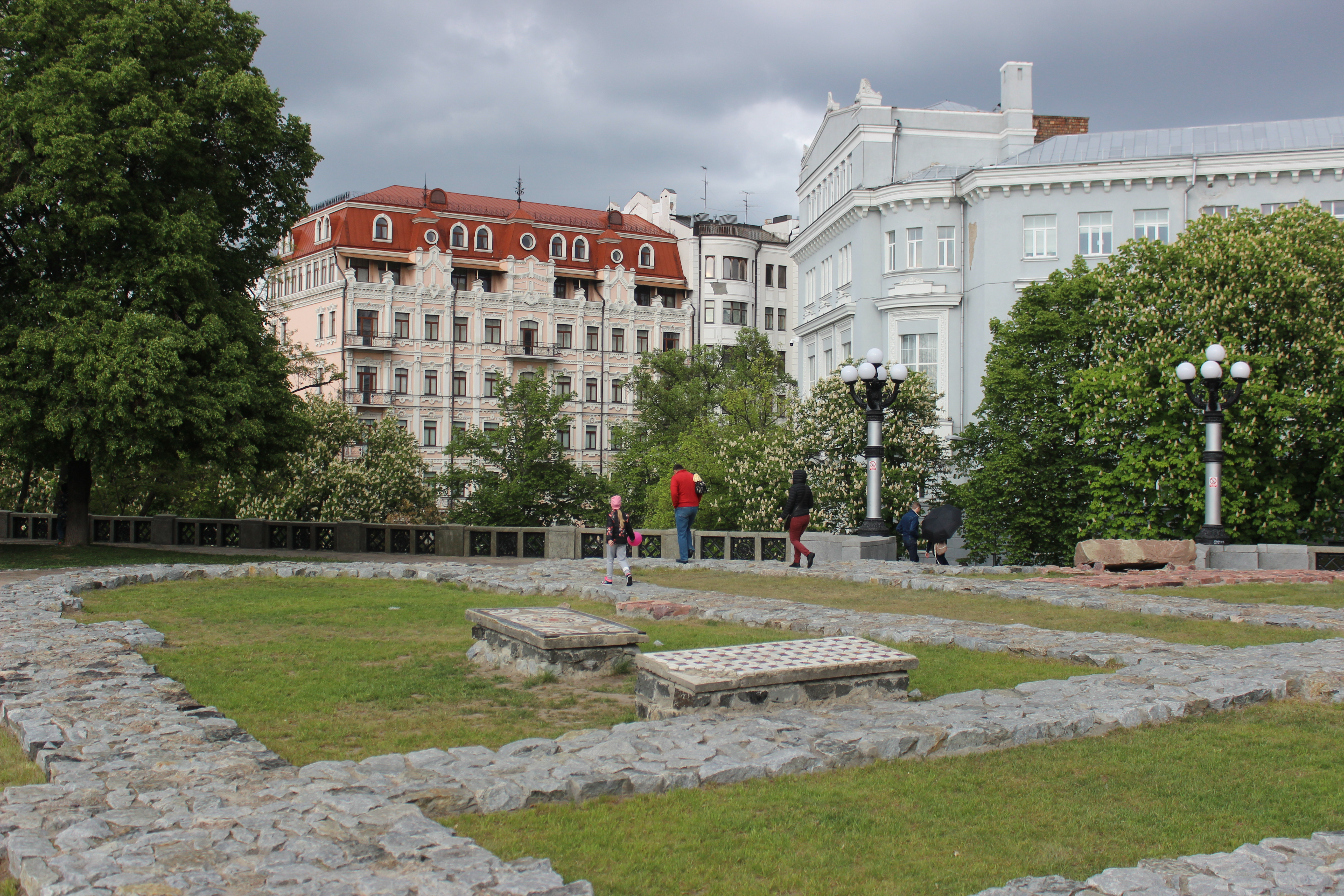 uk:Місто Володимира — Дитинець Стародавнього Києва з фундаментом Десятинної церкви, Київ, Володимирська вул., 2